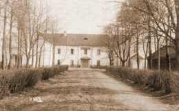 Беларуская (тарашкевіца): Будынак Маладэчанскай настаўніцкай сэмінарыі